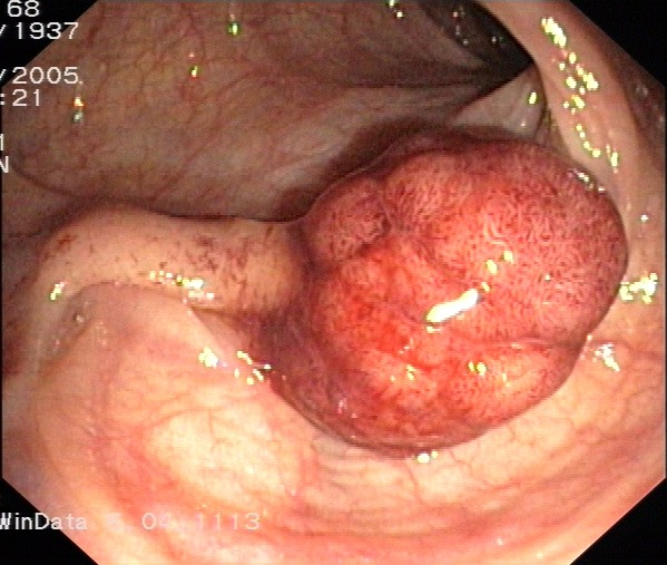 Dickdarmpolyp im Sigma (Grimmdarm) vor der Abtragung